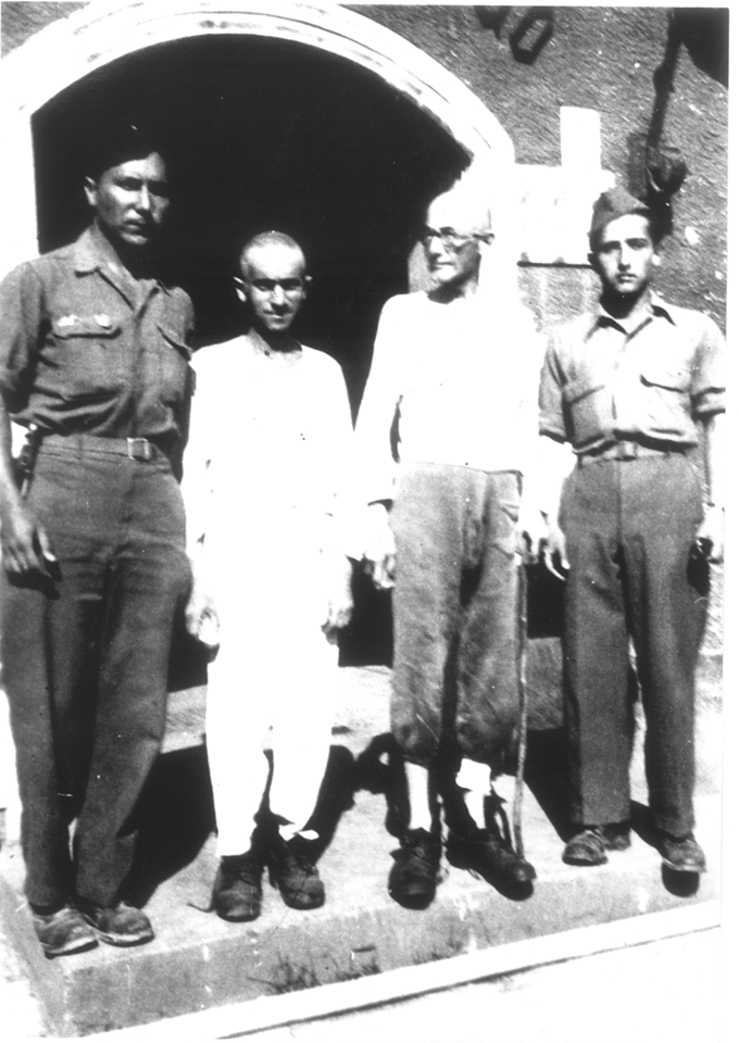 Sidney Chouraqui (à gauche) et son camarade André Bibas (à droite) avec deux déportés du camp de Landsberg